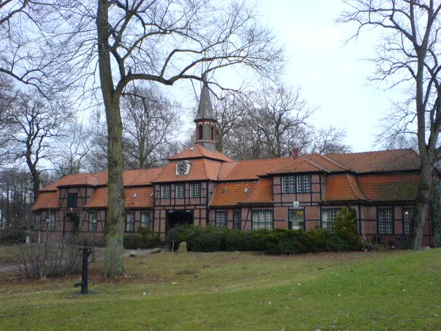 =Torhaus Wellingsbüttel_2006 mit Alstertal-Museum Urheber=PodracerHH 20:36, 9. Jan. 2007 (CET) Datum=02.2006